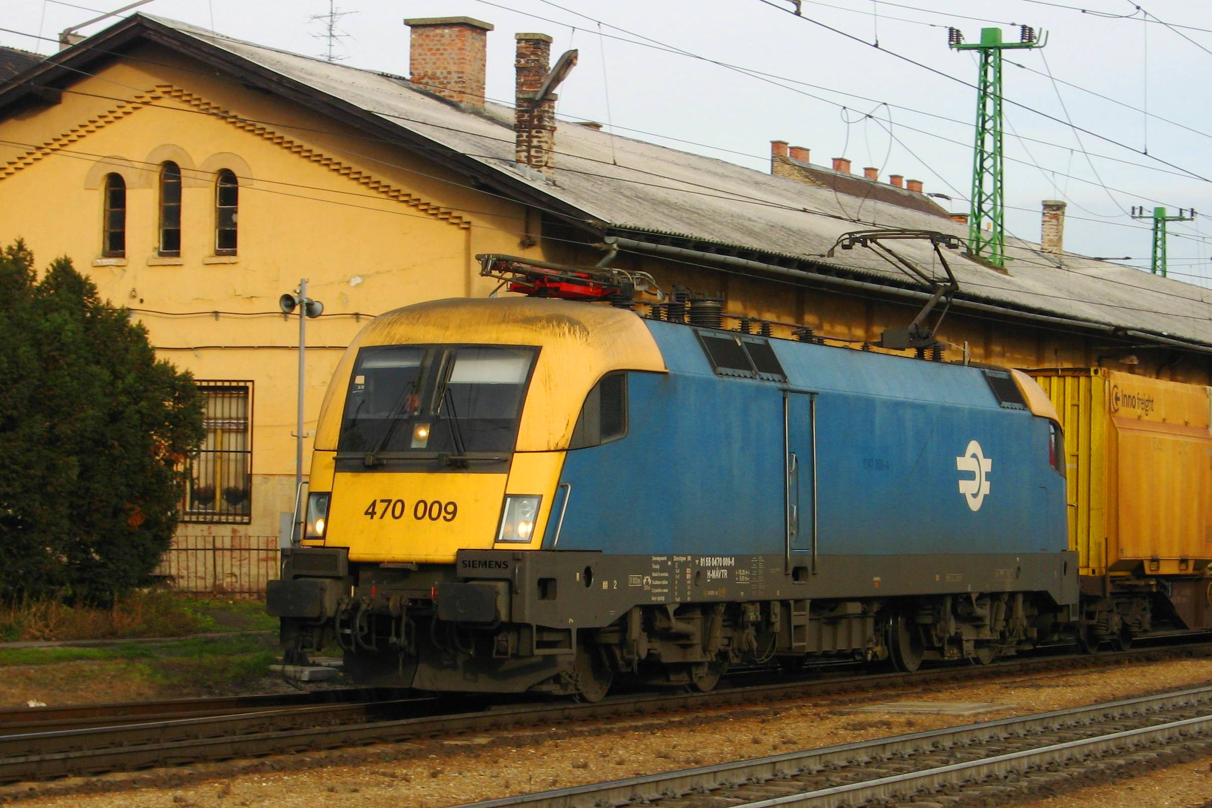 MÁV Taurus